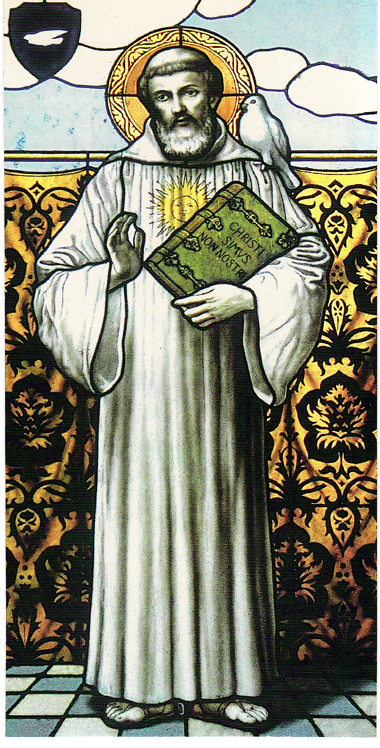 Vitral con San Columbano, en la abadía de Bobbio